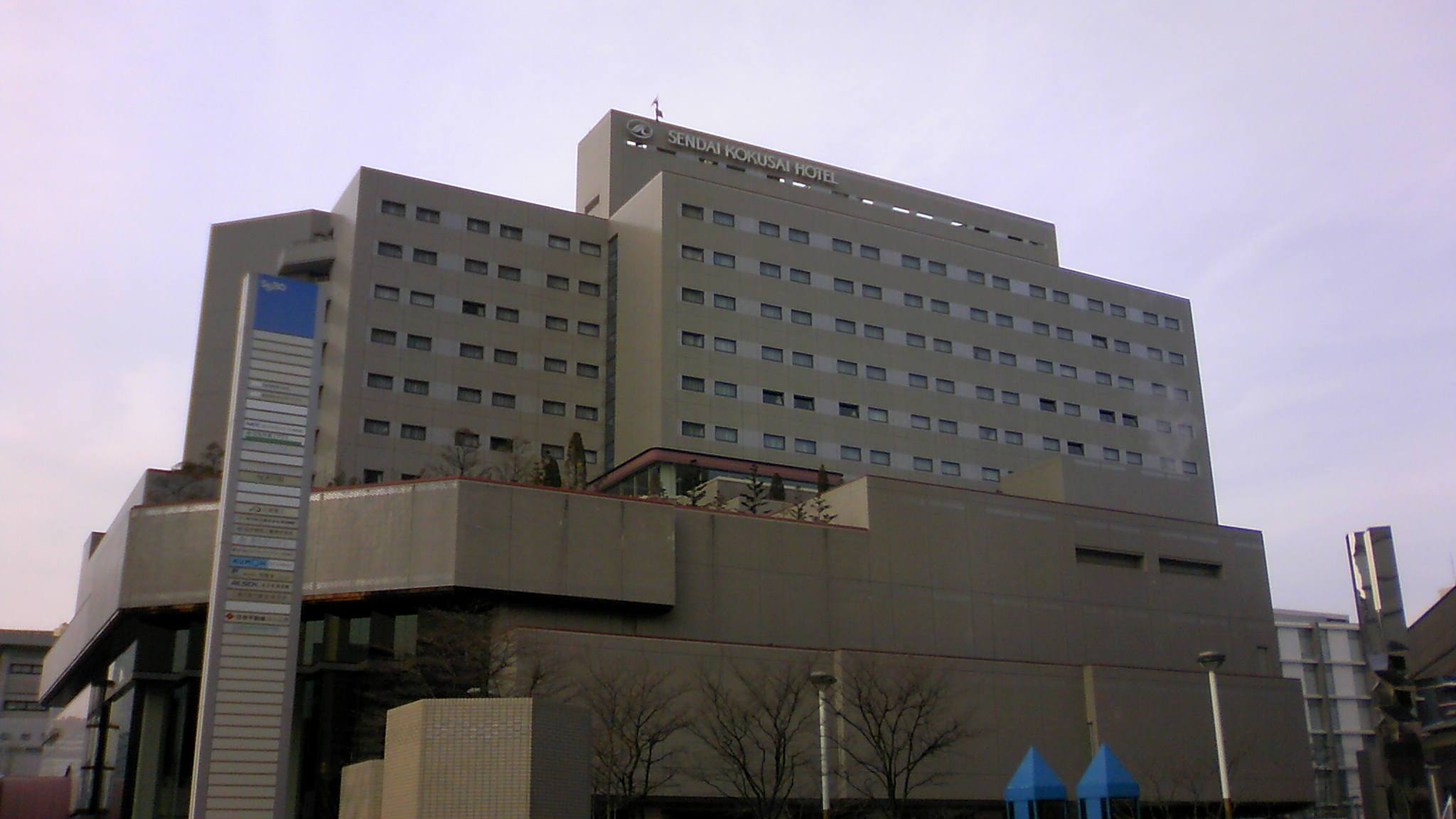 仙台国際ホテル